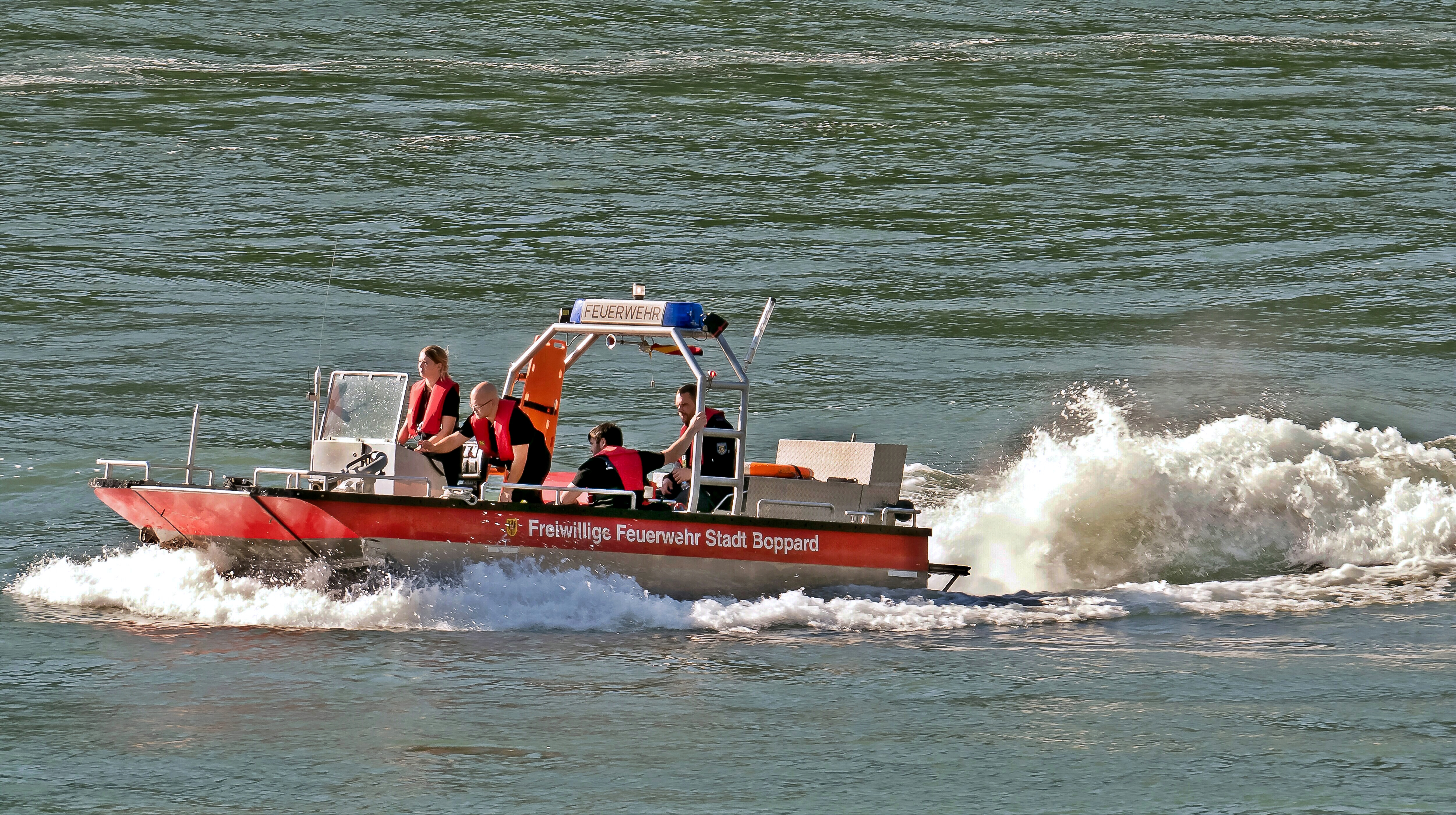 Fahrzeugdaten: Baujahr: 2000 Hersteller: Schmidt Stahlbau Typ: Seemöwe Aufbau: Schmidt Stahlbau Leistung: 174 KW / 200 PS Besatzung: 1/5 (Staffel) Antrieb: Jet - Antrieb Länge: 7 m Höhe: 2,55 m Breite: 2,32 m Gewicht: 2380 kg Beladung: Tragkraftspritze Monitor Zumischermischer Schaummittel 2 C-Schlauchkörbe Lichtmast UKW Schiffsfunk Tiefenmesser (Echolot) hydr. absenkbarer Bug